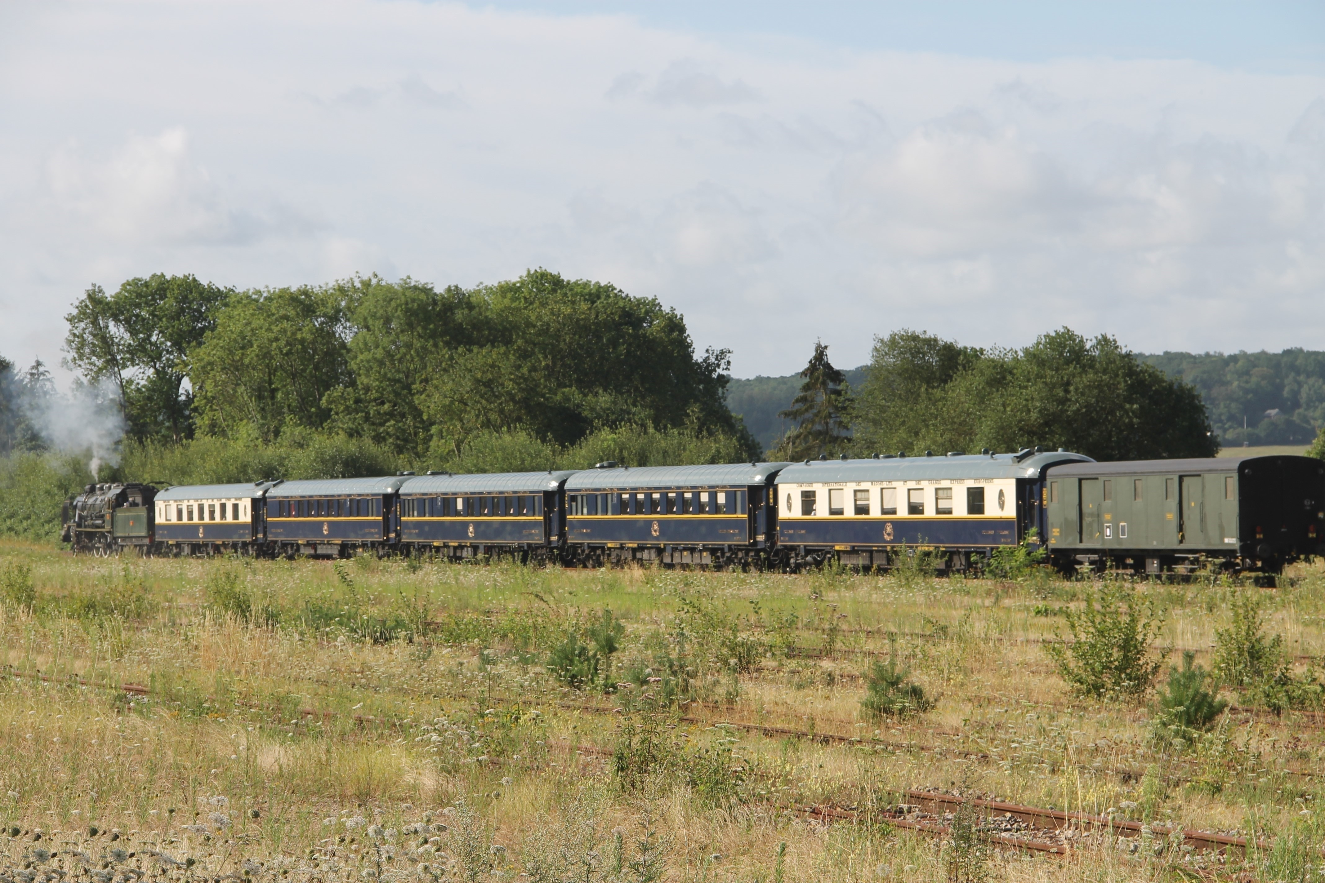 Voitures de l'Orient-Express rachetées par la SNCF tirées par la 231 G 558 du Pacific Vapeur Club au départ de Glos-Montfort en juillet 2018.